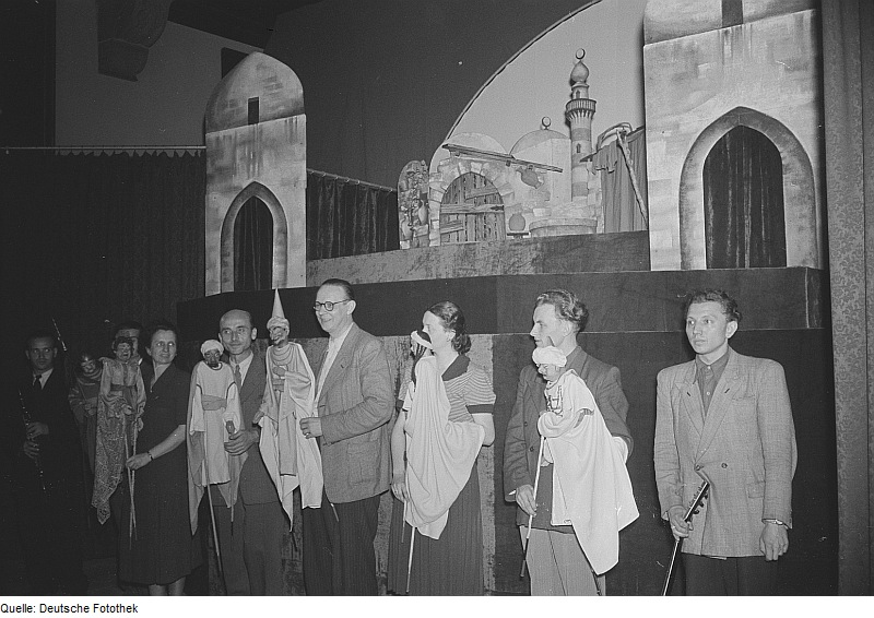 Original image description from the Deutsche FotothekPuppenspieler Paul Hölzig mit Kollegen auf der Bühne bei einer Aufführung einer Hodsha Nasreddin-Geschichte